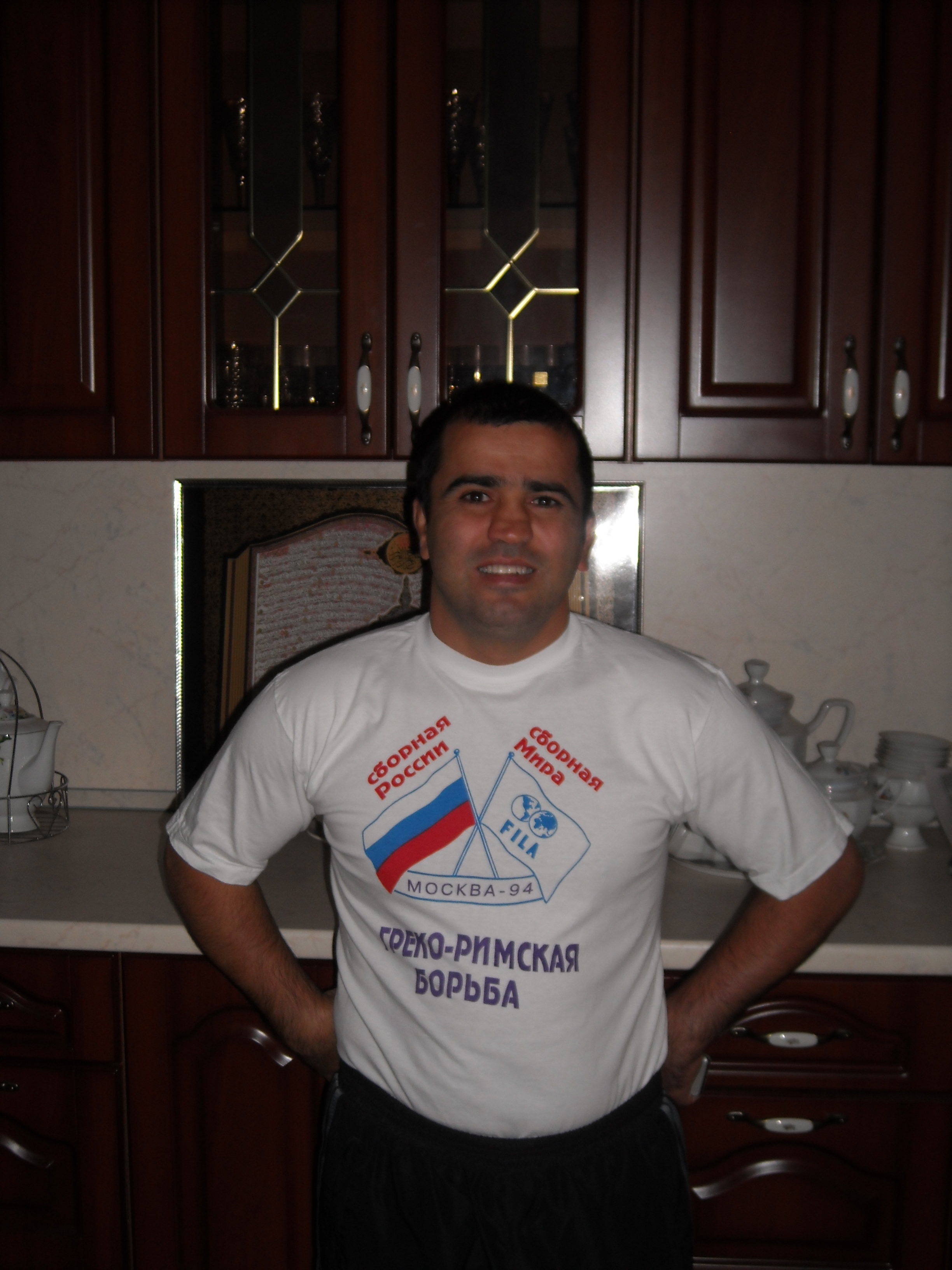 В гостях у друзей семьи Якуповых (Ульяновск)